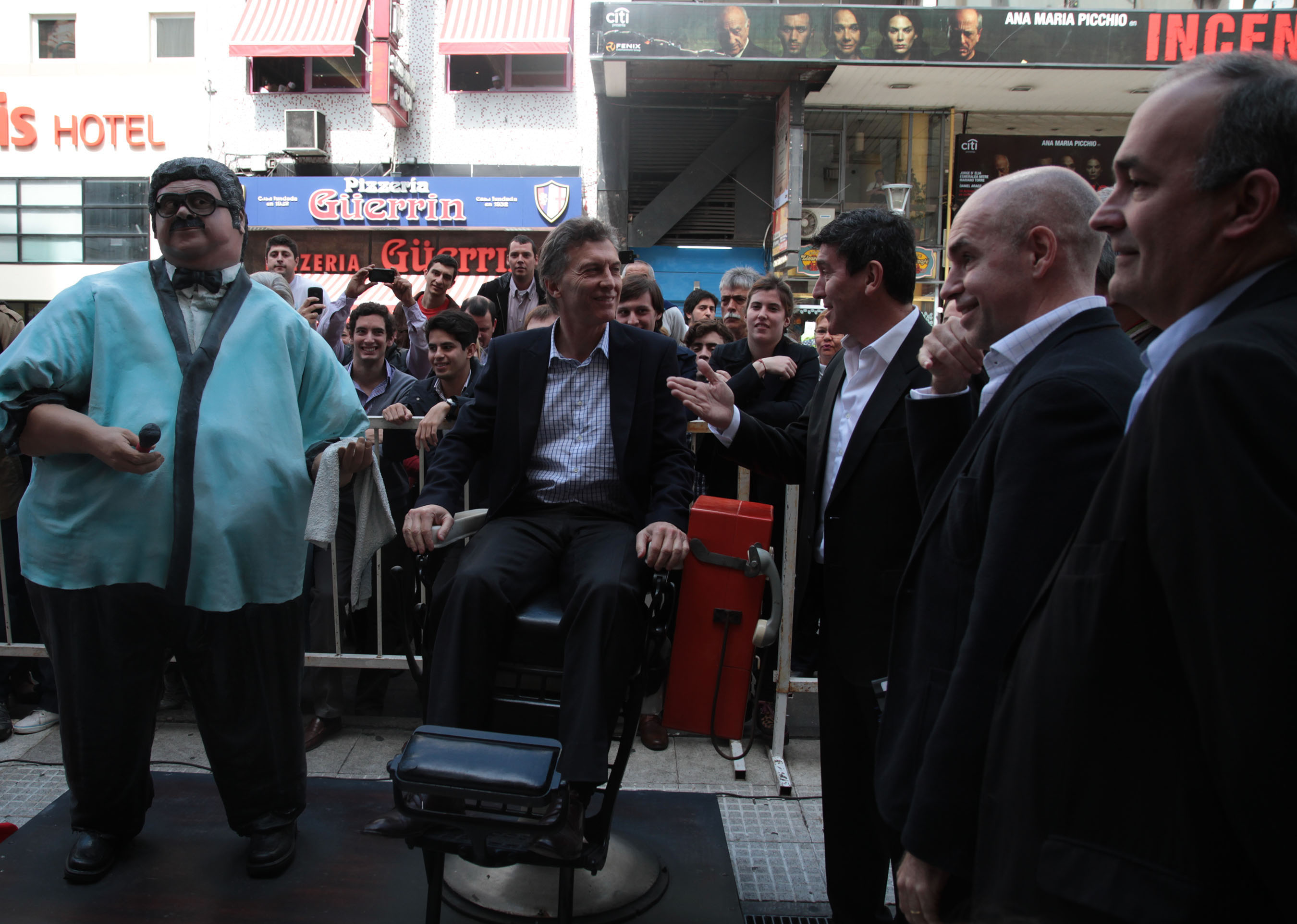 Buenos Aires. Setiembre 6 de 2013. El jefe de Gobierno porteño inauguró esta tarde la estatua del recordado personaje televisivo Don Mateo, que fue protagonizado por el actor Jorge Porcel. Foto Matias Repetto-gv/GCBA.